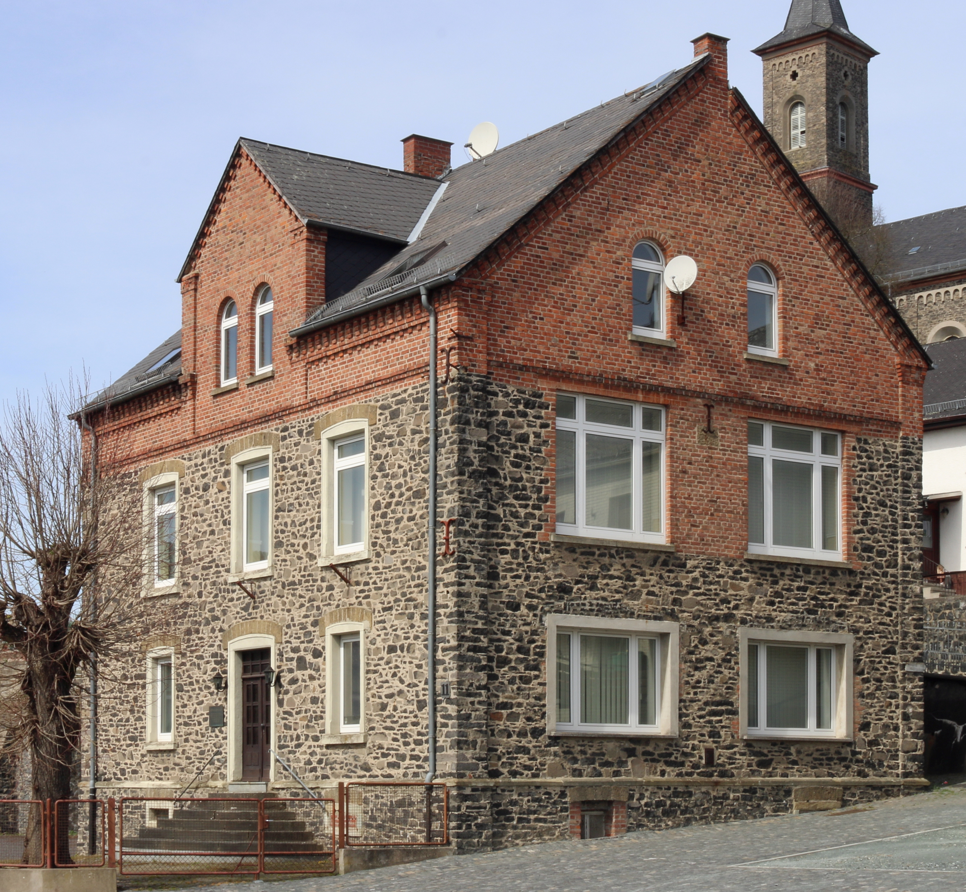 Waldbrunn (Westerwald) Ellar, Landkreis Limburg-Weilburg: Ludwig-Bös-Haus, heute Museum